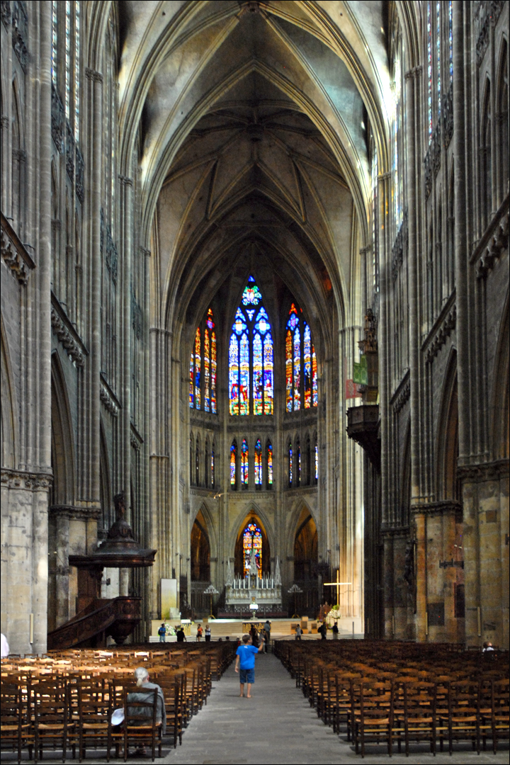 La cathédrale Saint-Étienne est l’église principale du diocèse de Metz en Moselle. Surnommée « lanterne du bon Dieu[1] », elle est la cathédrale de France ayant la plus grande surface vitrée — près de 6 500 m2 — et qui présente les plus grandes verrières gothiques d’Europe. Avec sa voûte suspendue à quarante-et-un mètres au-dessus du sol, la nef est la troisième plus haute de France. (extrait de Wikipedia)